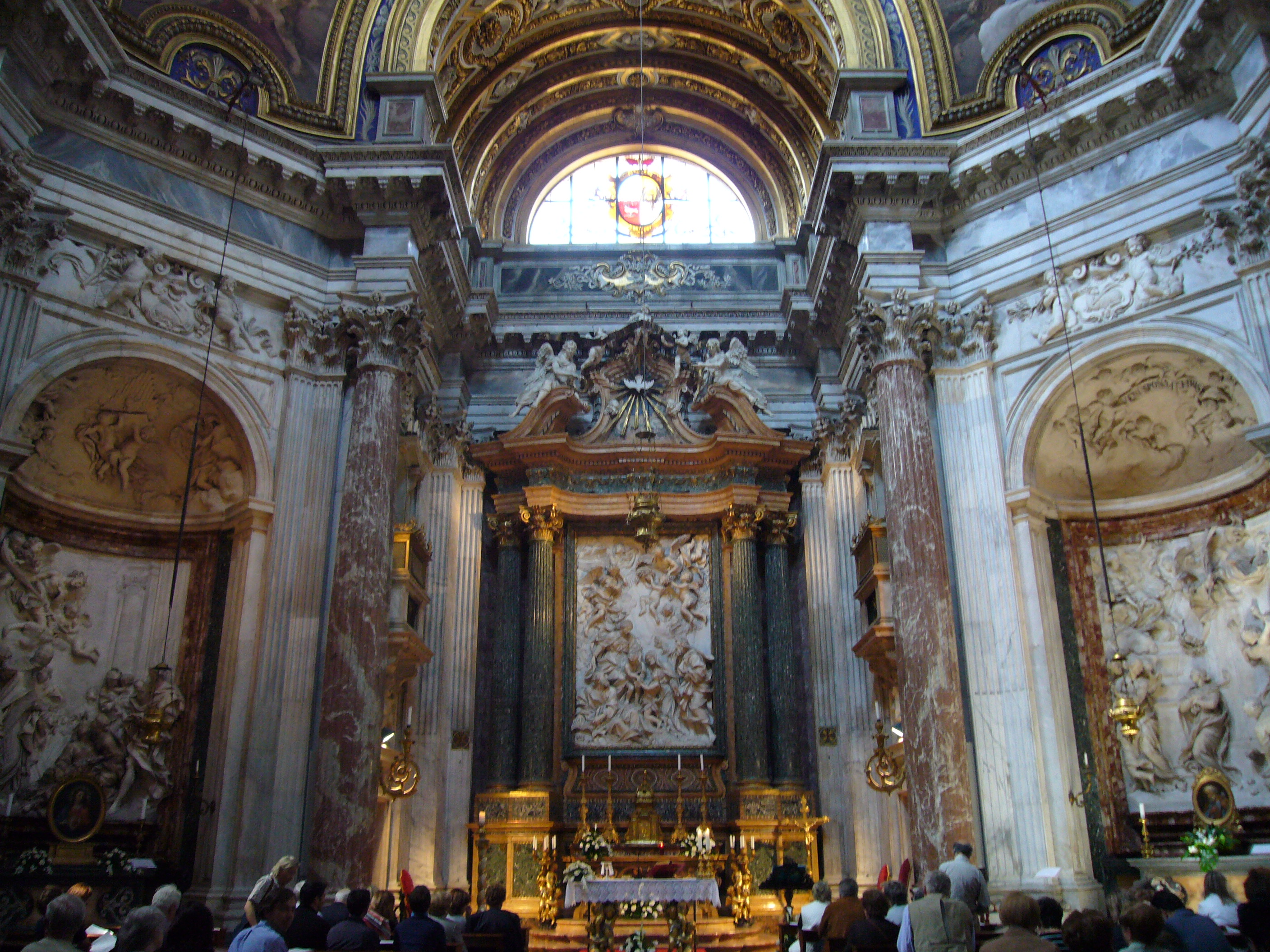 Roma, Sant'Agnese in Agone, interno